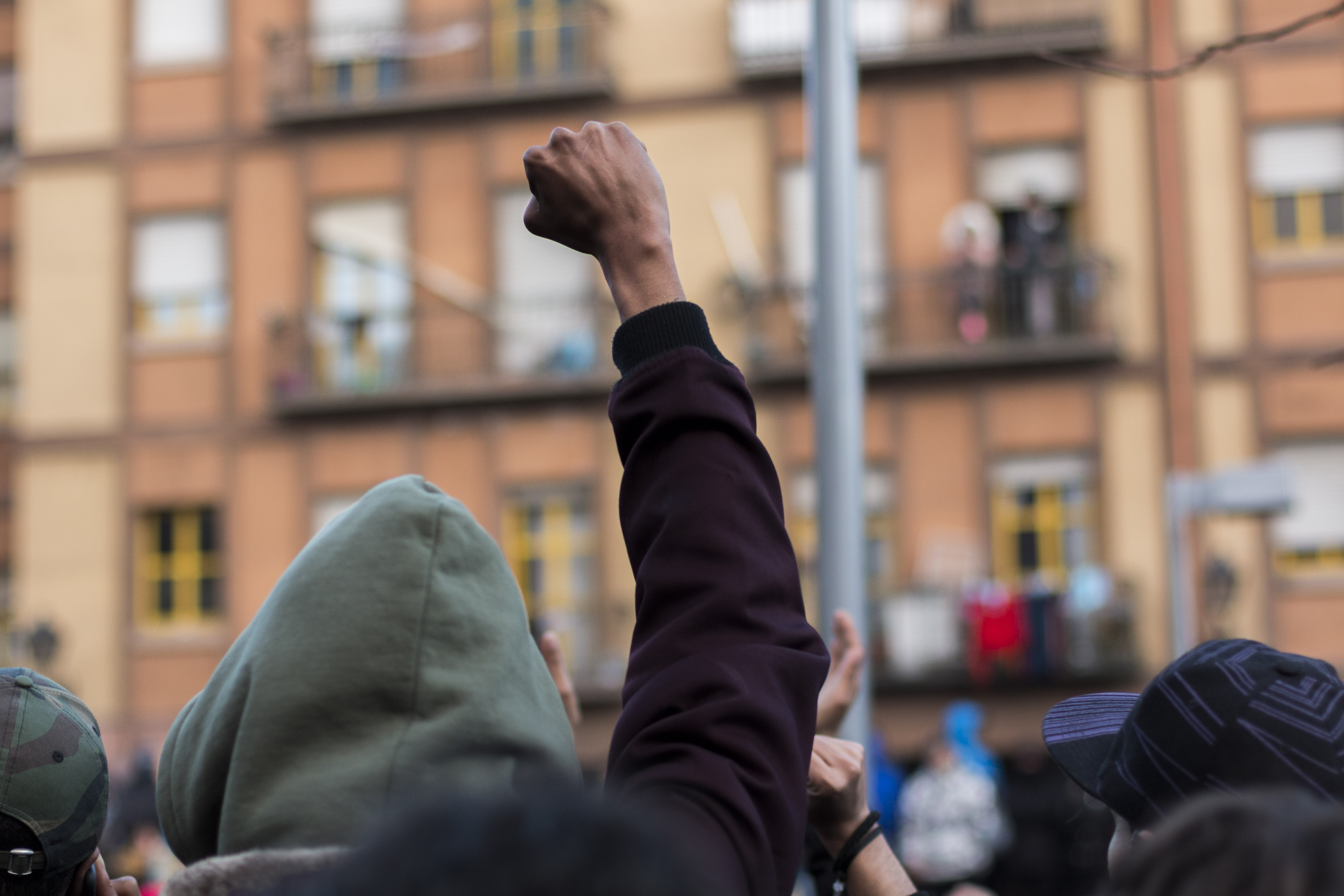 2018-03-16, Madrid, Concentración por Mmame Mbage. Barrio de Lavapiés.